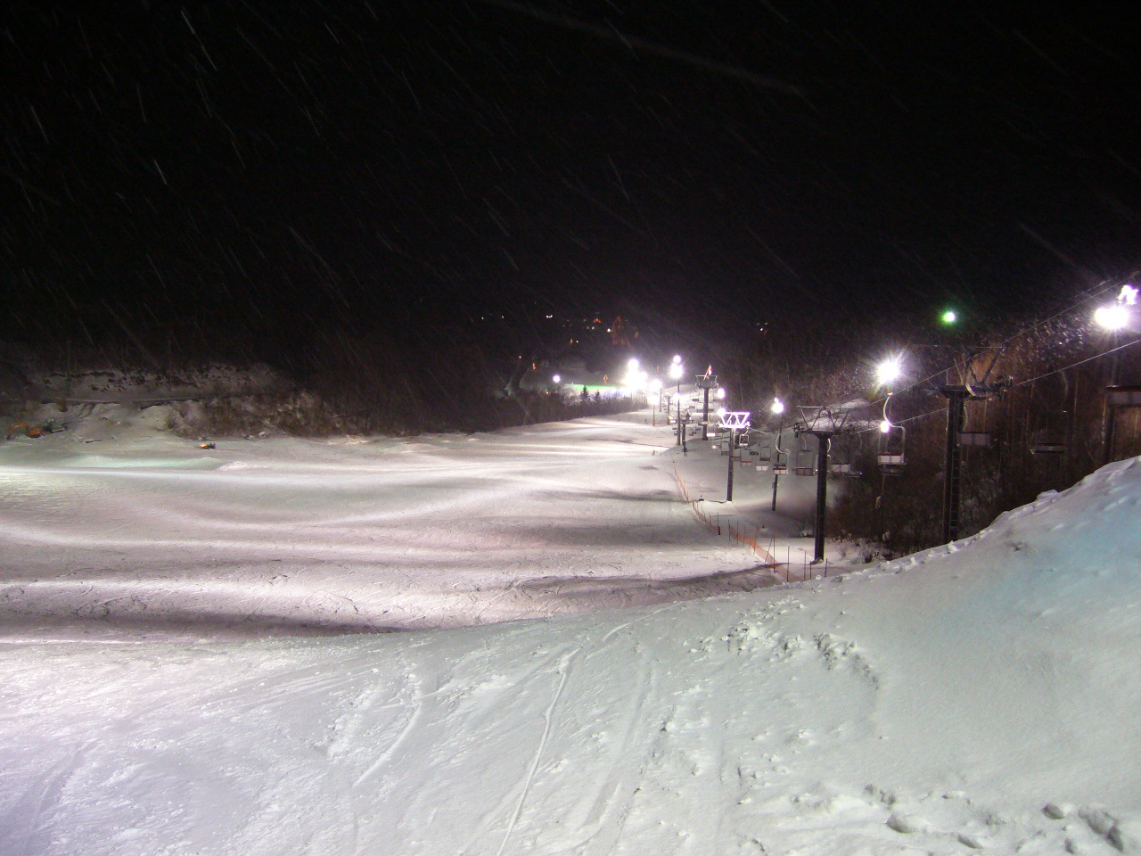 2006シーズン、ナイター営業中のいがやスキー場のゲレンデ（プライマリーコース上部よりリフト乗り場方向）